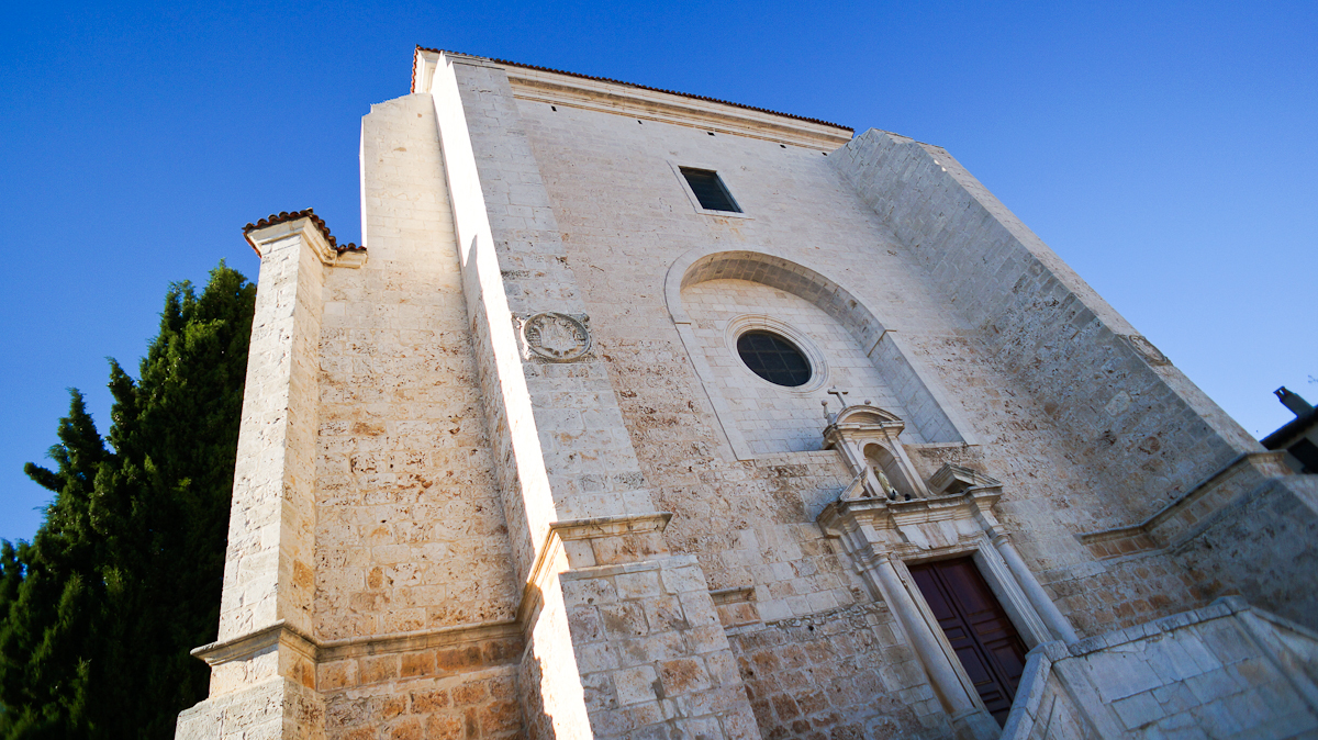 Un Día en Chinchón Puedes ver la entrada completa en